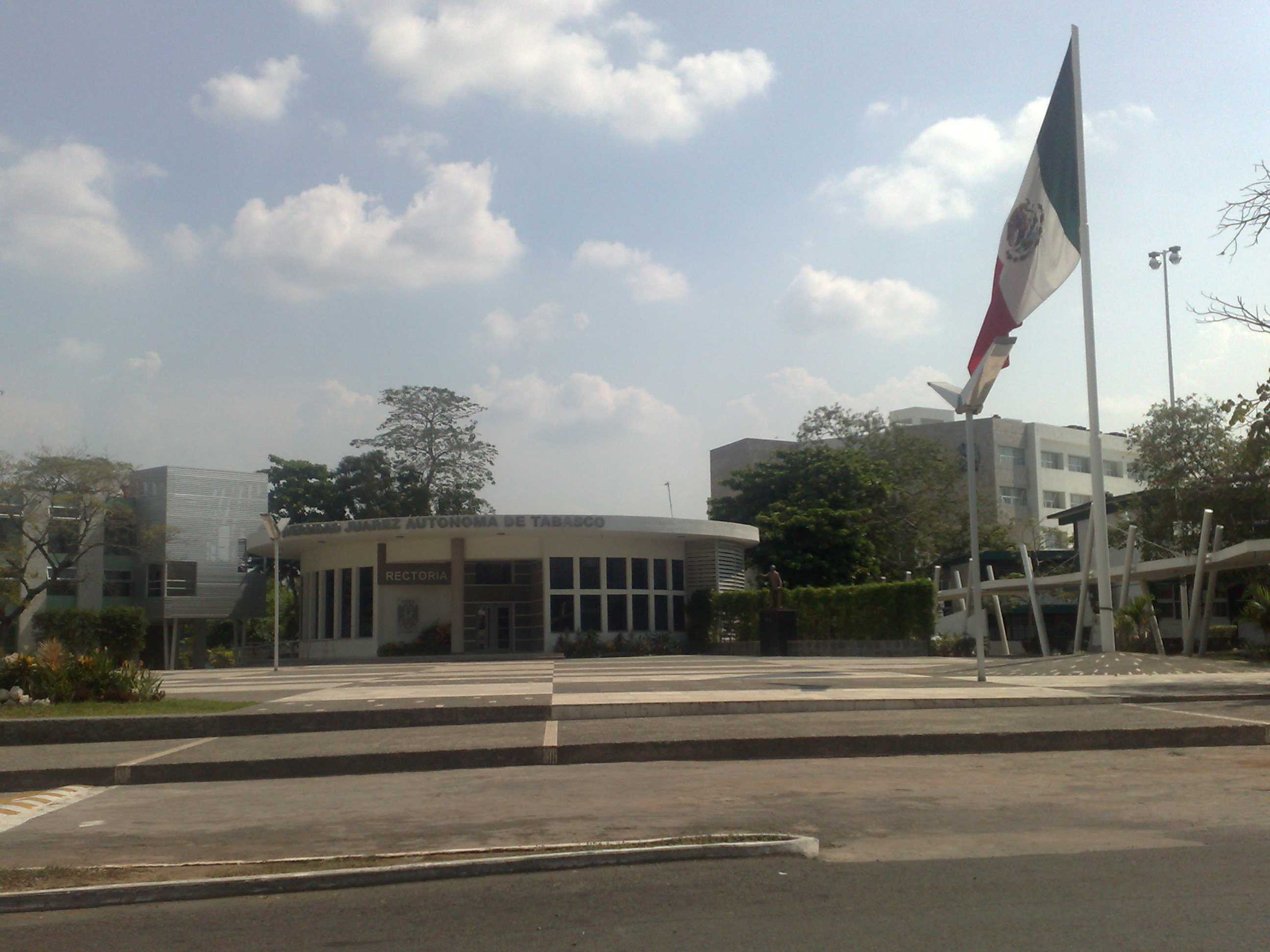 Edificio de Rectoría y explanada principal de la Universidad Juárez Autónoma de Tabasco, en Villahermosa, Tabasco, México.